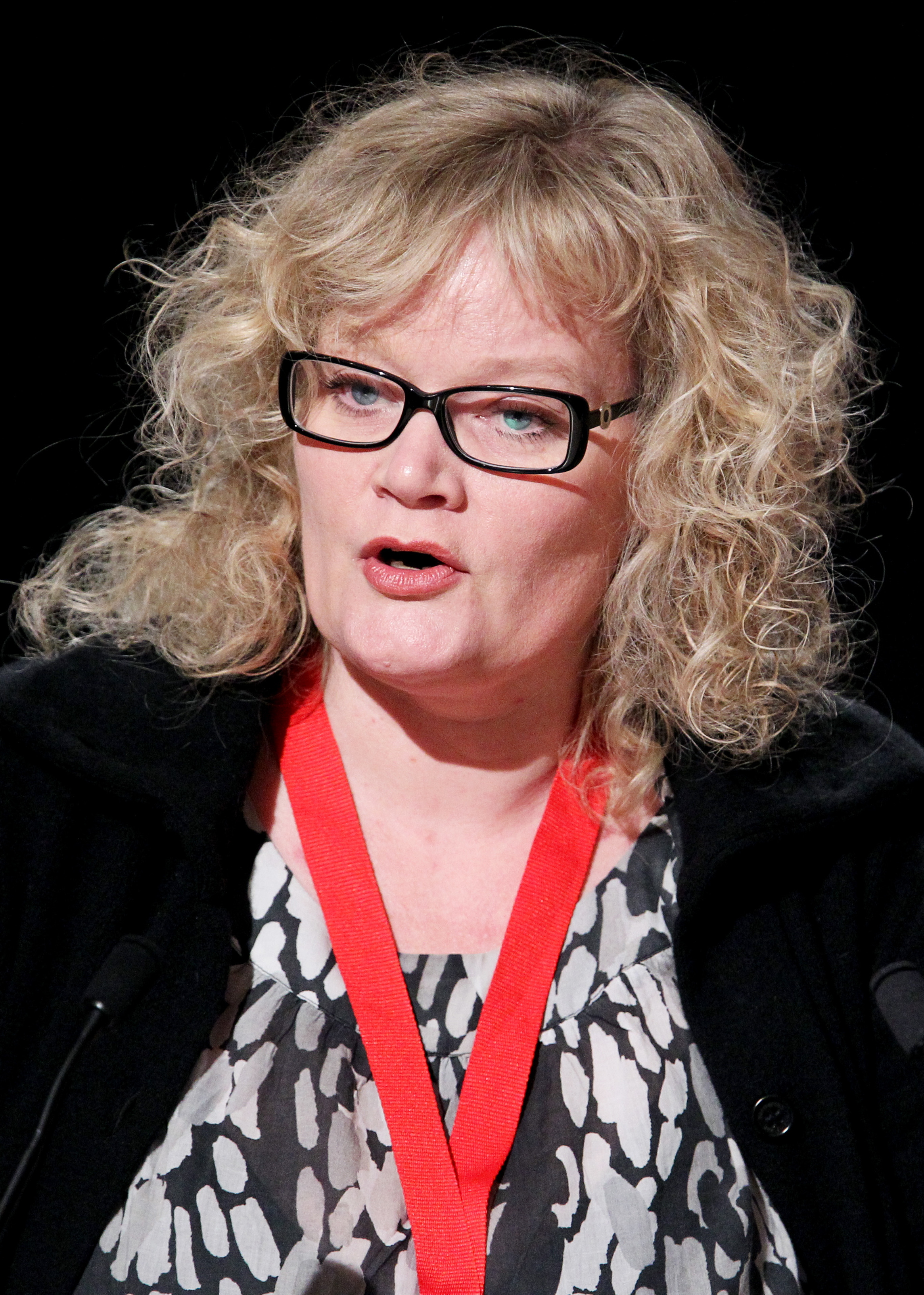 Katrin Sjögren vid Nordiska Rådets session på Island 2010-11-04.